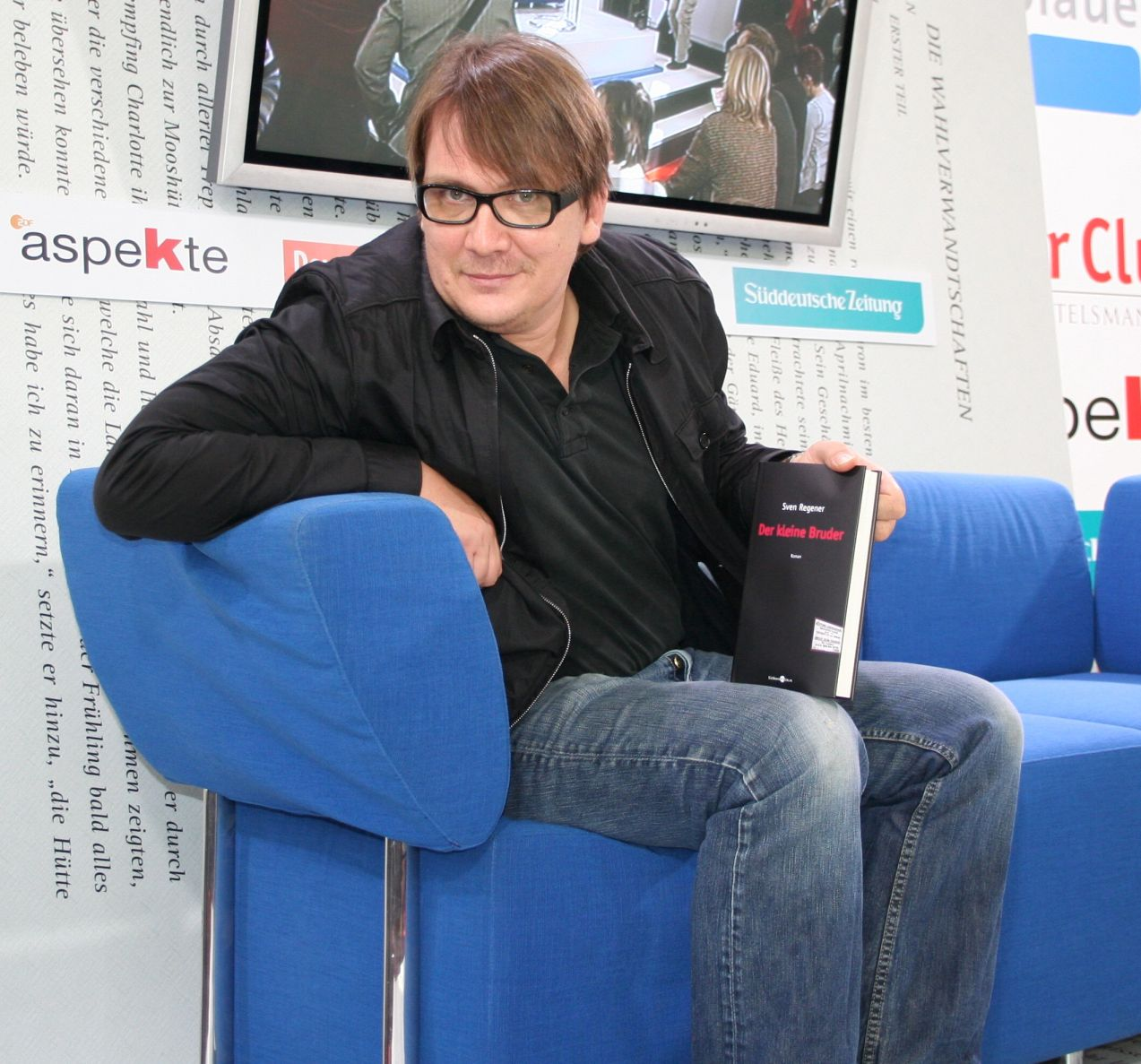 Sven Regener auf dem "Blauen Sofa" auf der Frankfurter Buchmesse mit seinem Roman "Der kleine Bruder"